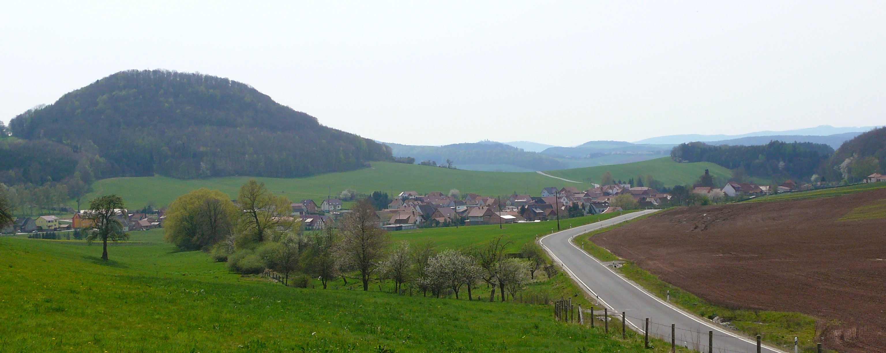 Blick auf Rustenfelde von Nordosten, links hinten der Rusteberg